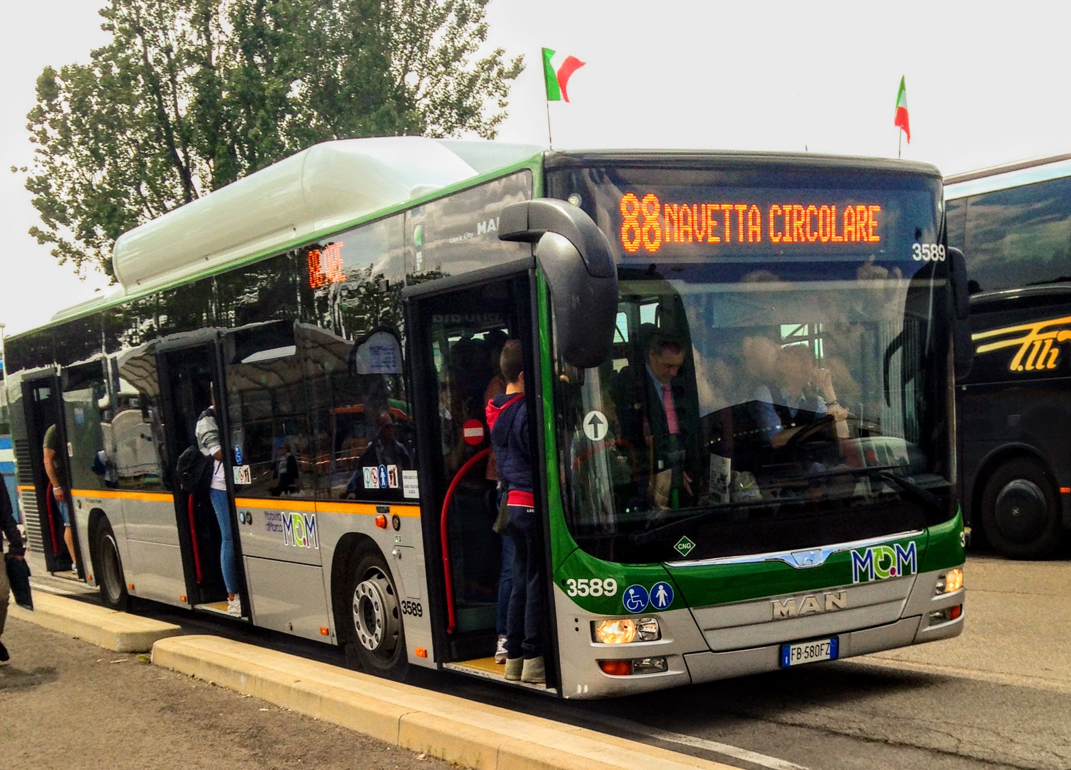 Autobus urbano MAN Lion's City matr.3589 di MOM-Mobilità di Marca (ex rete urbana ACTT Treviso), targato FB580FZ. Servizio urbano Treviso, Linea 88, navetta circolare in occasione dell'Adunata degli Alpini. Presso Autostazione Provvisoria Hub Ovest Mercato Ortofrutticolo, le Stiore (Treviso).